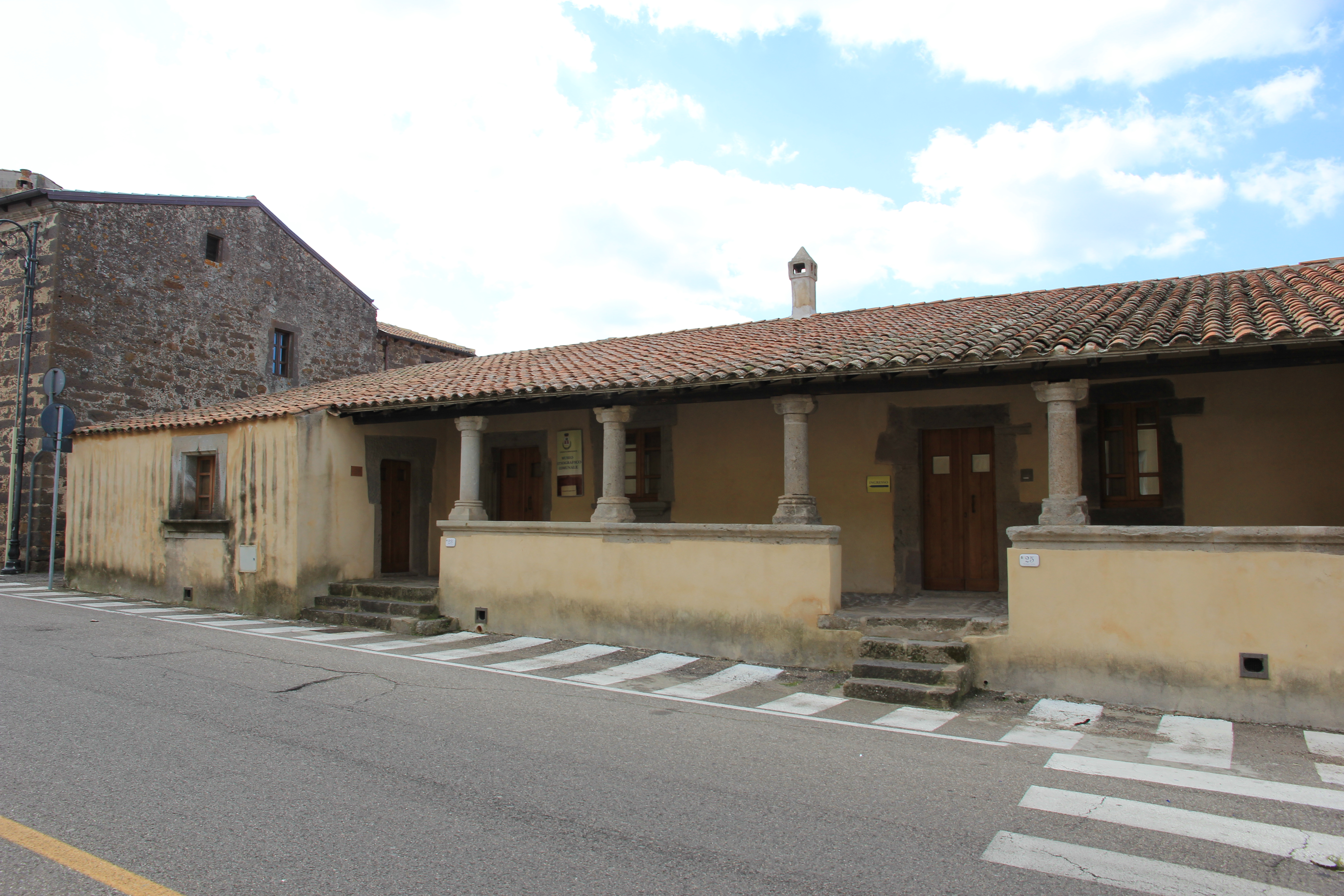 Abbasanta - Museo etnografico comunale (loggia aragonese)